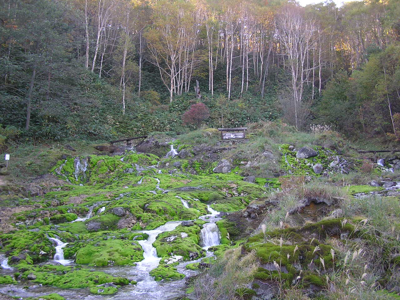 穴地獄